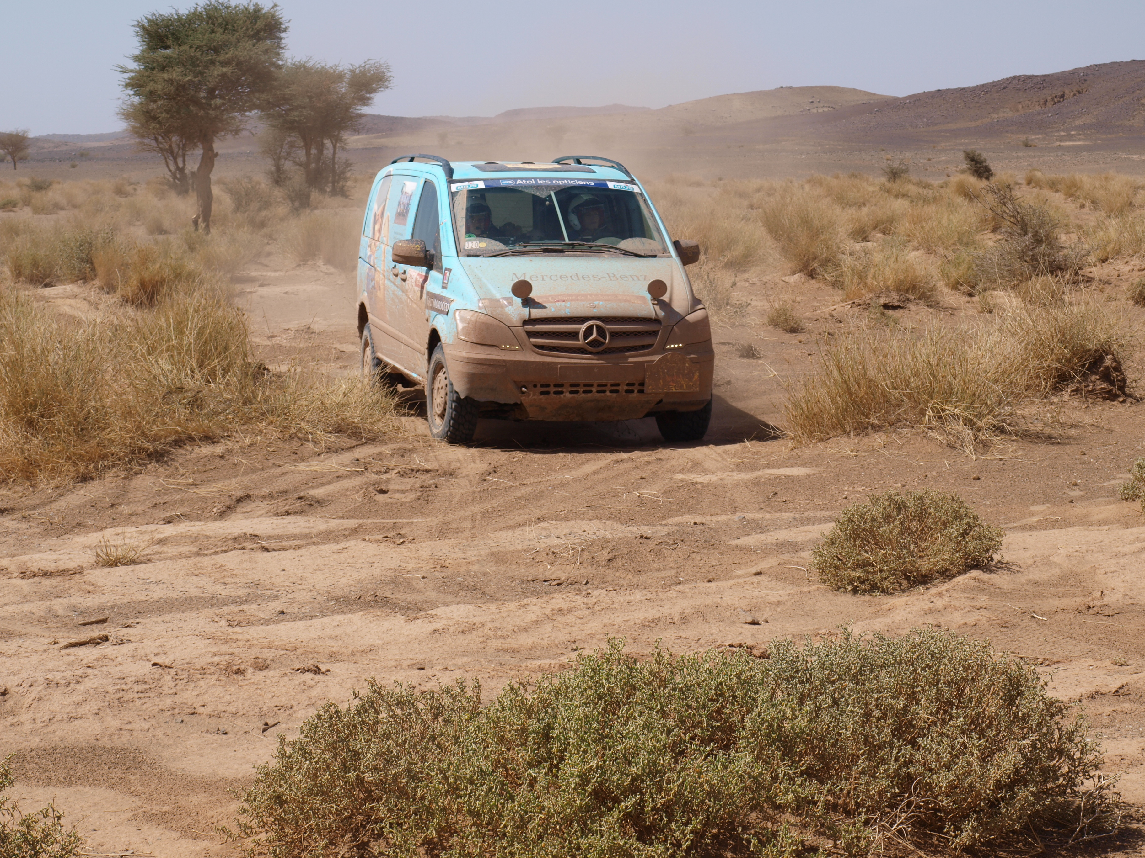 2012 Team 320 Mercedes-Benz Vito 4x4